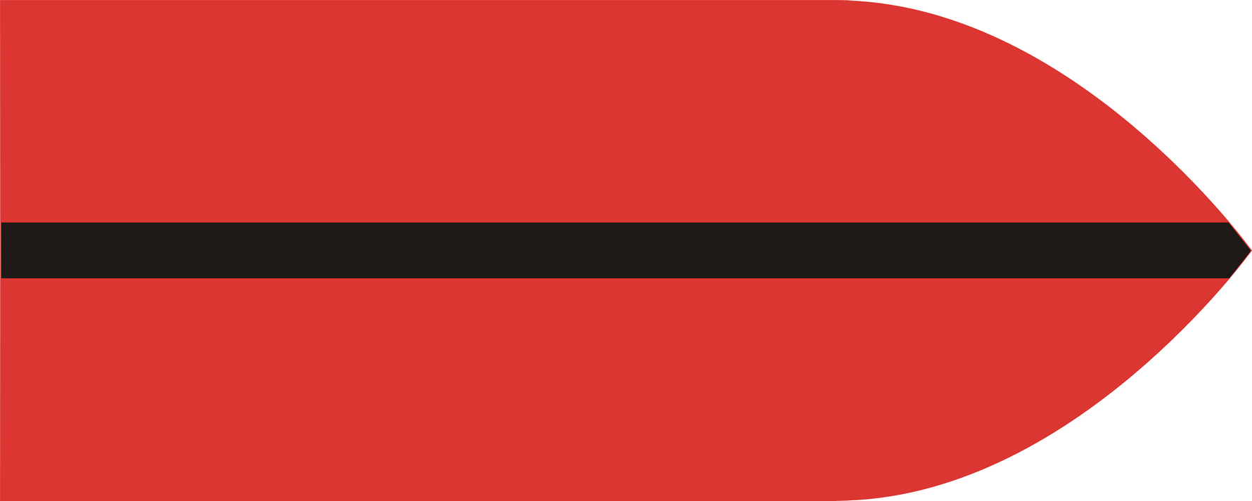 Barwy kompanii pionierów 2 Dywizji Strzelców Pieszych Polskich Sił Zbrojnych na Zachodzie